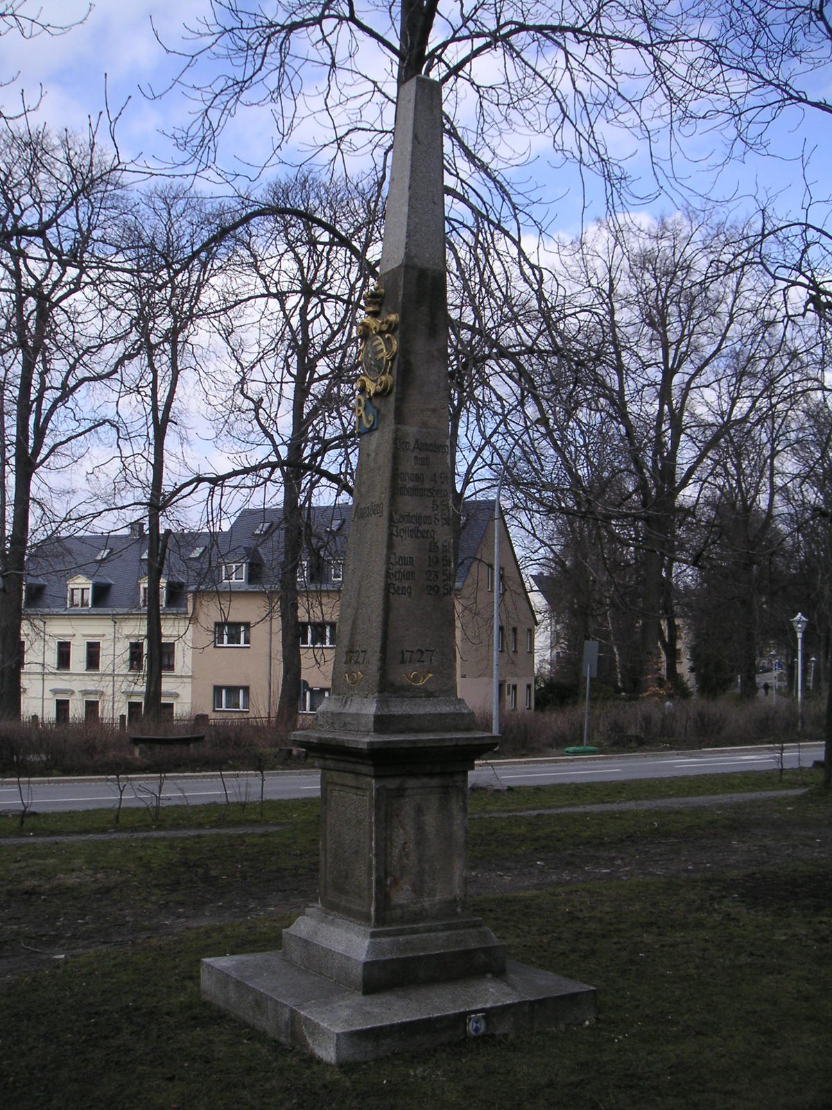 kursächsische Postmeilensäule von 1727 in Annaberg, Köselitzplatz